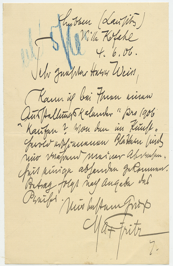 Letter von Max Fritz (1849-1920)